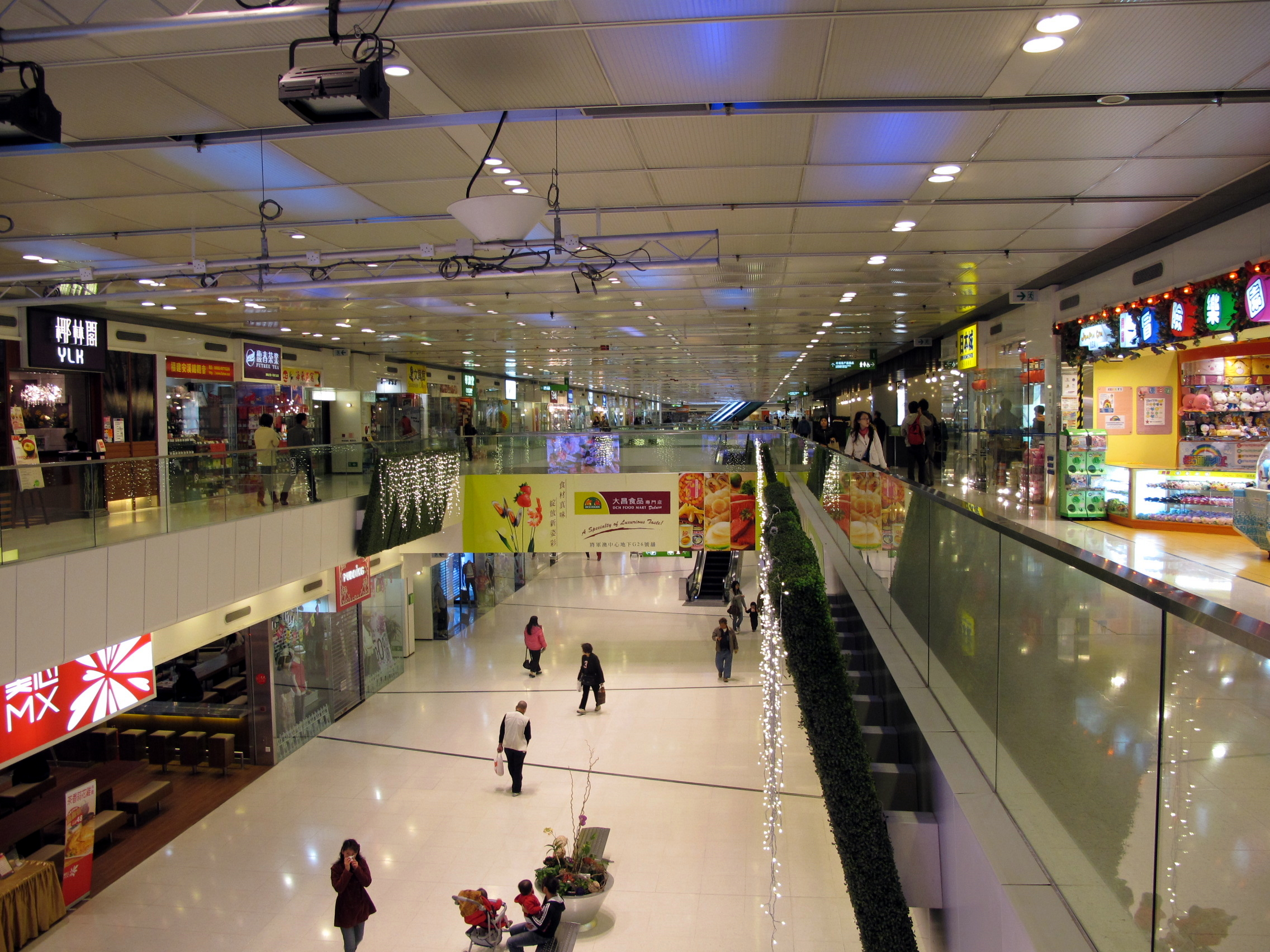 Park Central Mall Void